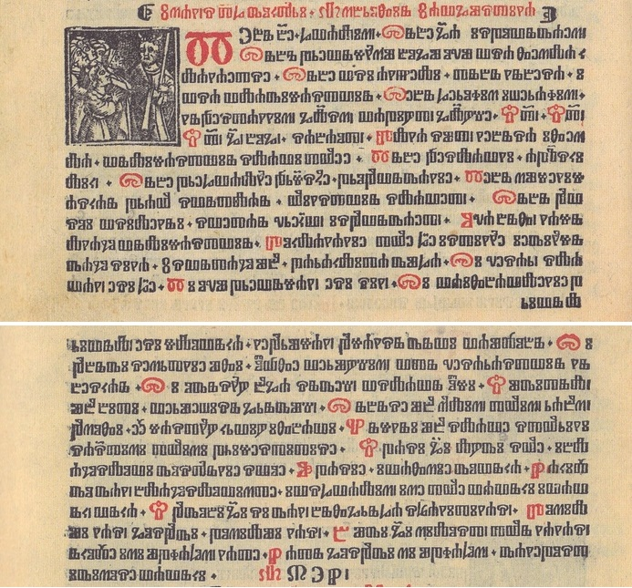 Гимн Тебе Бога хвалим на глаголице , напечатанный в первом полностью сохранившийся хорватский букваре, который издан в Венеции в 1527 г., в типографии Андрея Торессания (Andrea Toressanо).